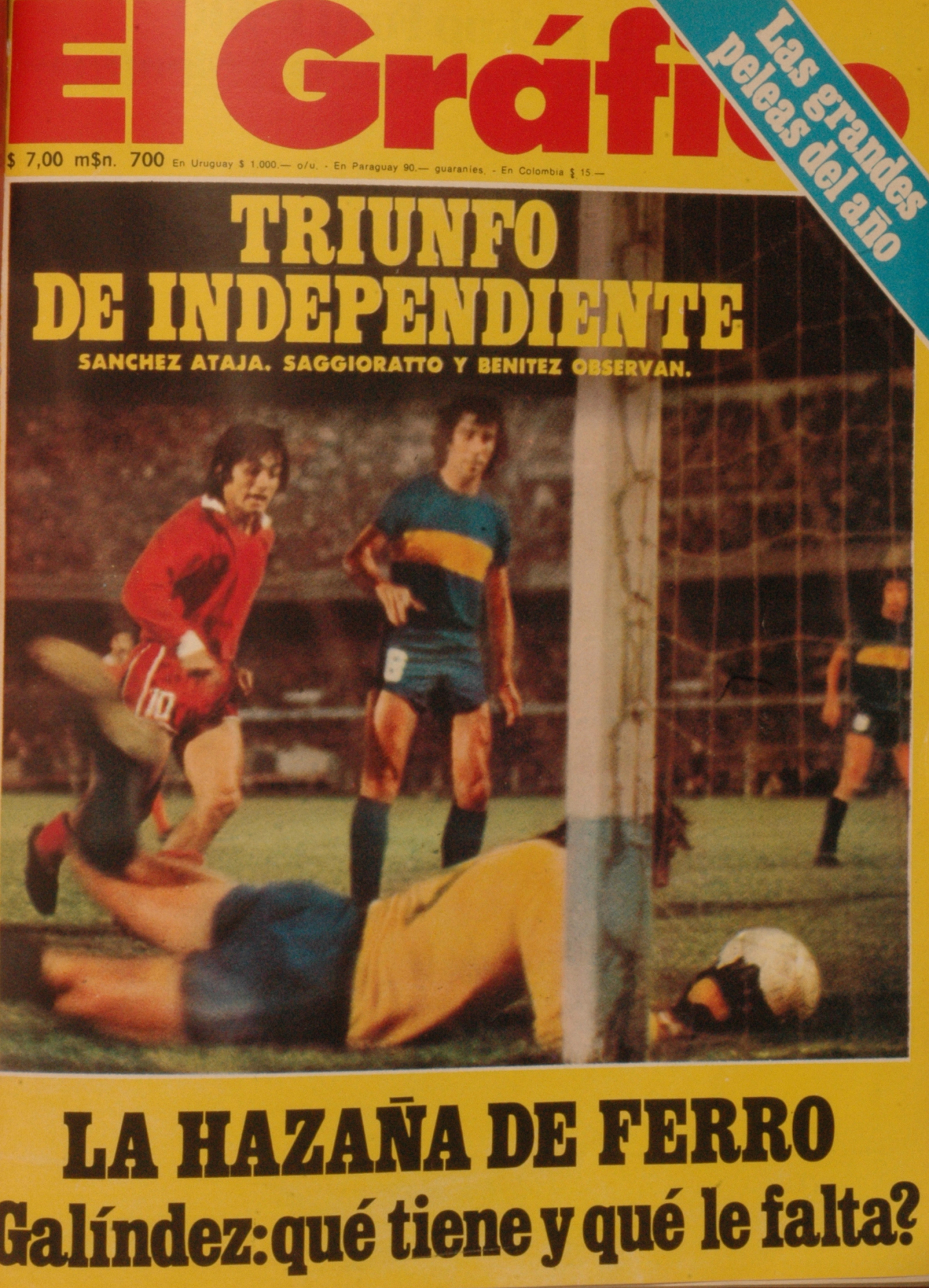 El Grafico del 04 de Diciembre de 1974. Edicion 2878